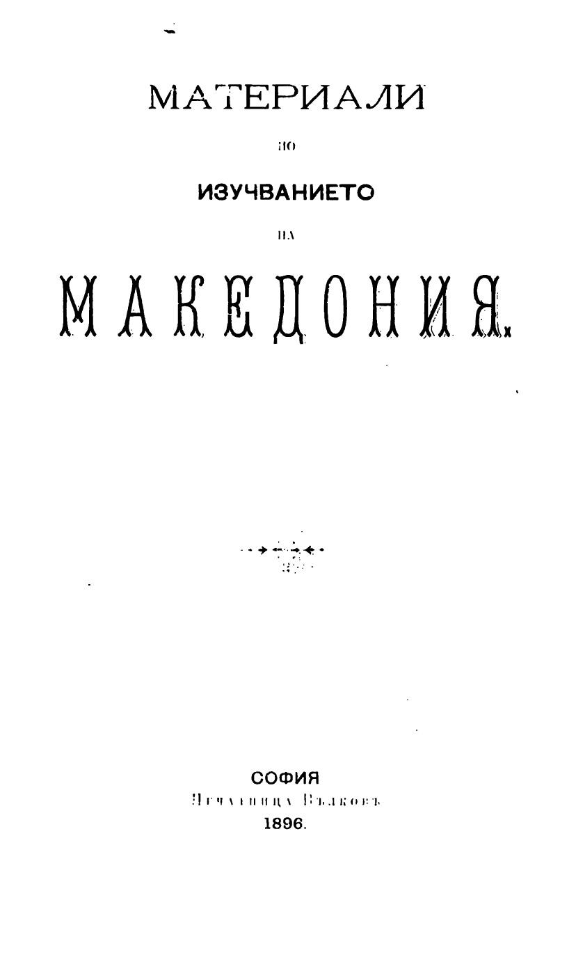 Корица на Материали по изучаванието на Македония на Гьорче Петров.